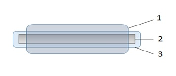 Barreau pour SBSE: 1) recouvrement de PDMS 2) Barreau magnétique 3) Verre enrobant le barreau